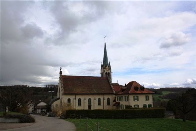 Römisch-katholische Kirche, Baldingen, Aargau, Schweiz